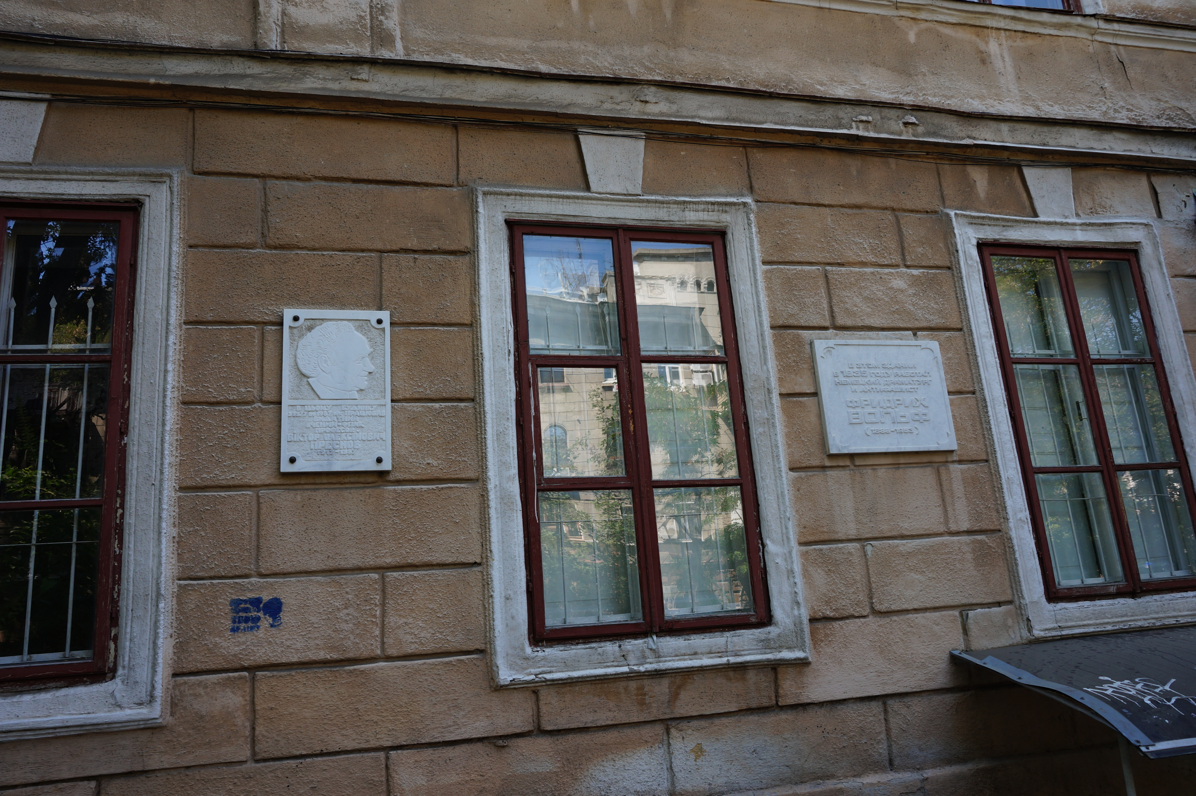 Особняк Фундуклея, в якому:- розміщувалась канцелярія М.С. Воронцова - генерал-губернатора Новоросійського краю., де бував О.С. Пушкін - російський поет,де жили та працювали:- Фрідріх Вольф - німецький драматург-антифашист;- Д.К. Добросердов - вчений хімік, засновник та перший зав.лабораторією неорганічної хімії ОДУ, проф.;- М.А. Умов - фізик, професор, Одеса, Пастера вул., 42